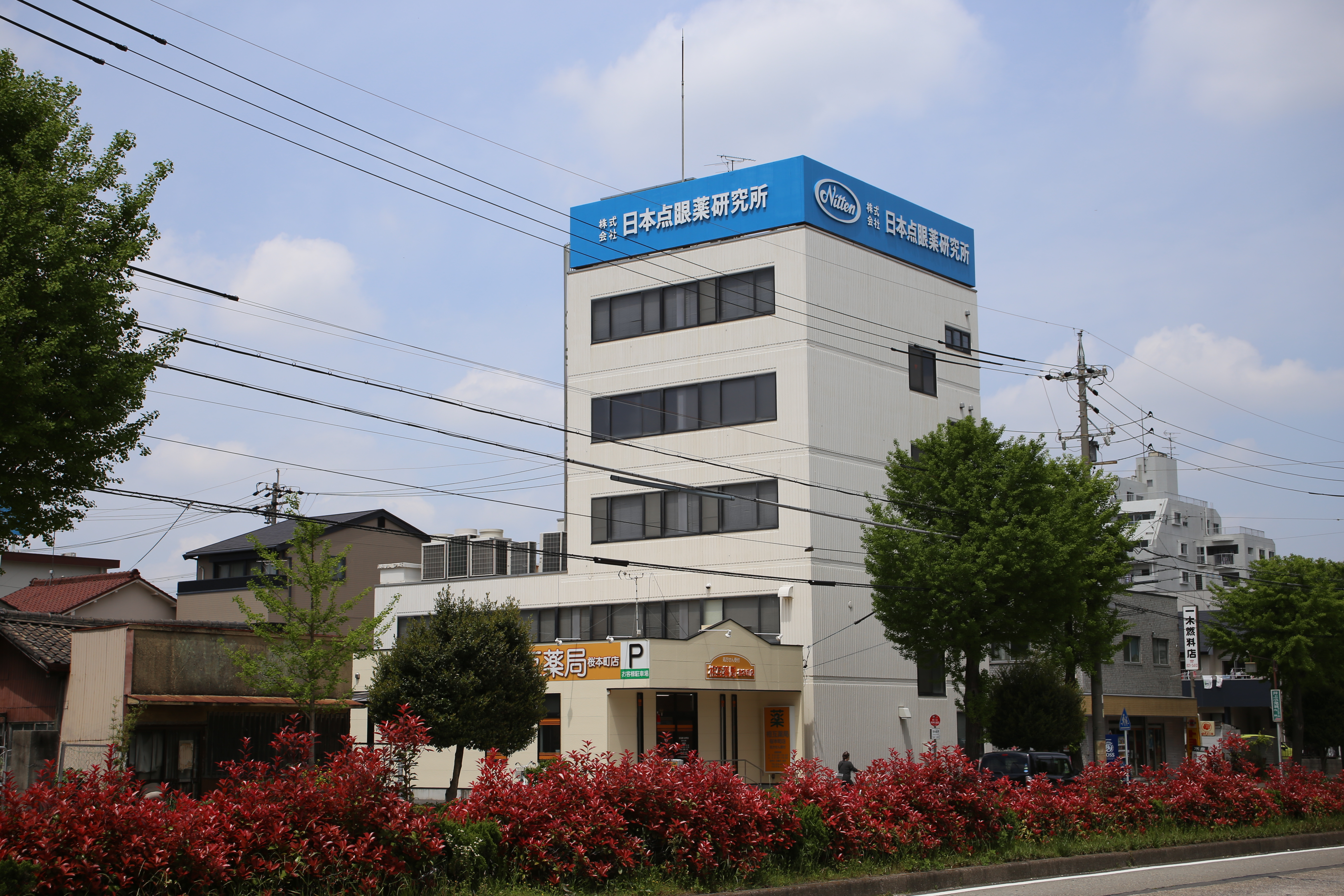 名古屋市南区桜本町の日本点眼薬研究所桜本町工場を東側公道南側より撮影